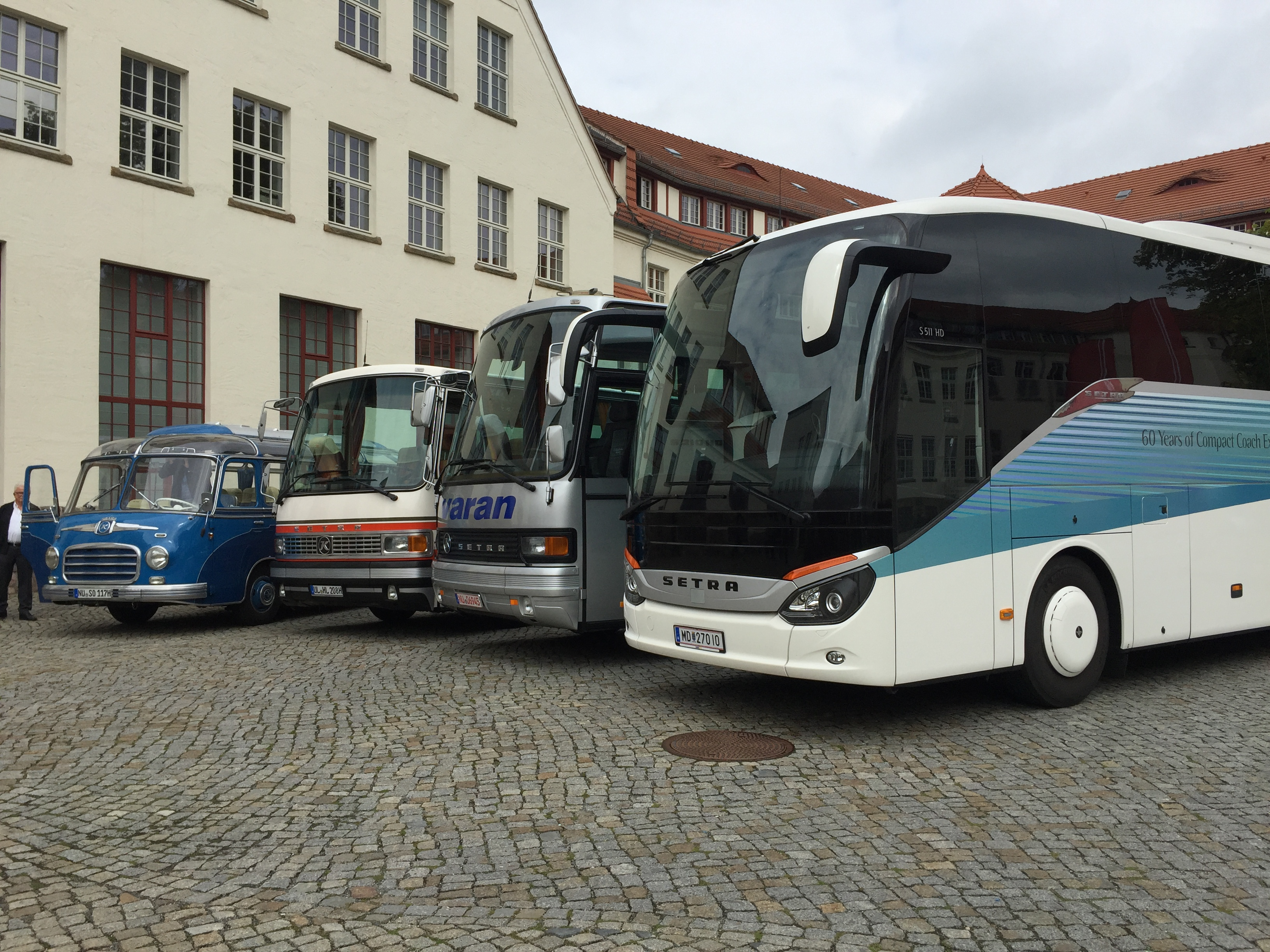 setra Bus generations